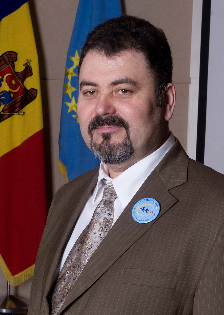 Anatol Şalaru (n. 7 februarie 1962, satul Văratic, raionul Rîşcani) este un politician din Republica Moldova. Deputat în Parlamentul Republicii Moldova.